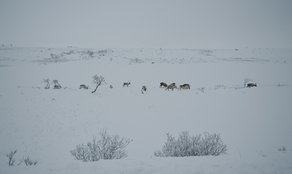 Renar på vinterbete i fjällen vid Pulmankivägen i Nuorgam, Utsjoki, Finland.